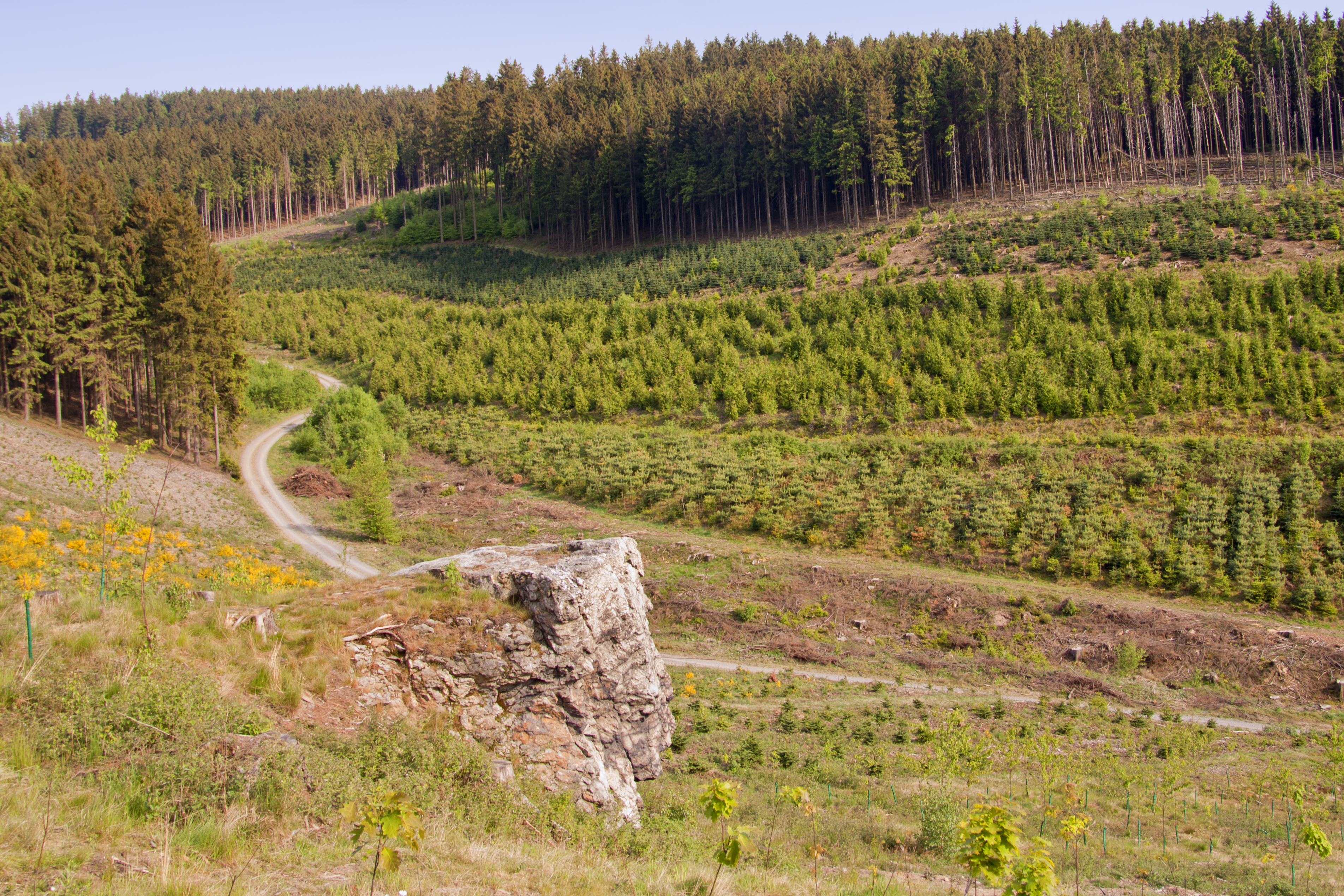 Naturdenkmal Ossenstein bei Sundern-Stockum